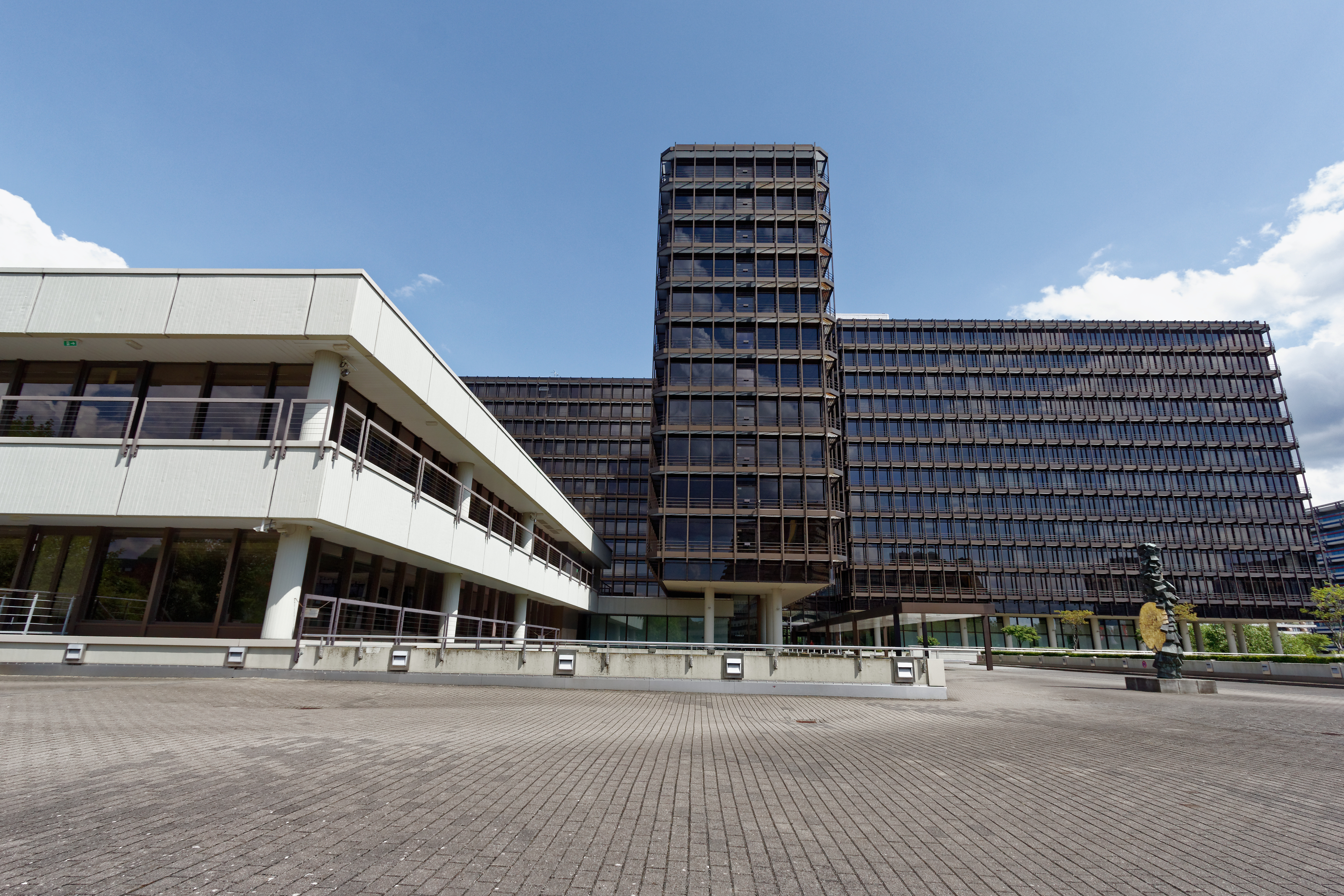 Hamburg-Winterhude, Bürostadt City Nord, Gebäude Überseering 35, ehemalige Hauptverwaltung der Deutschen Shell AGThis is a photograph of an architectural monument.